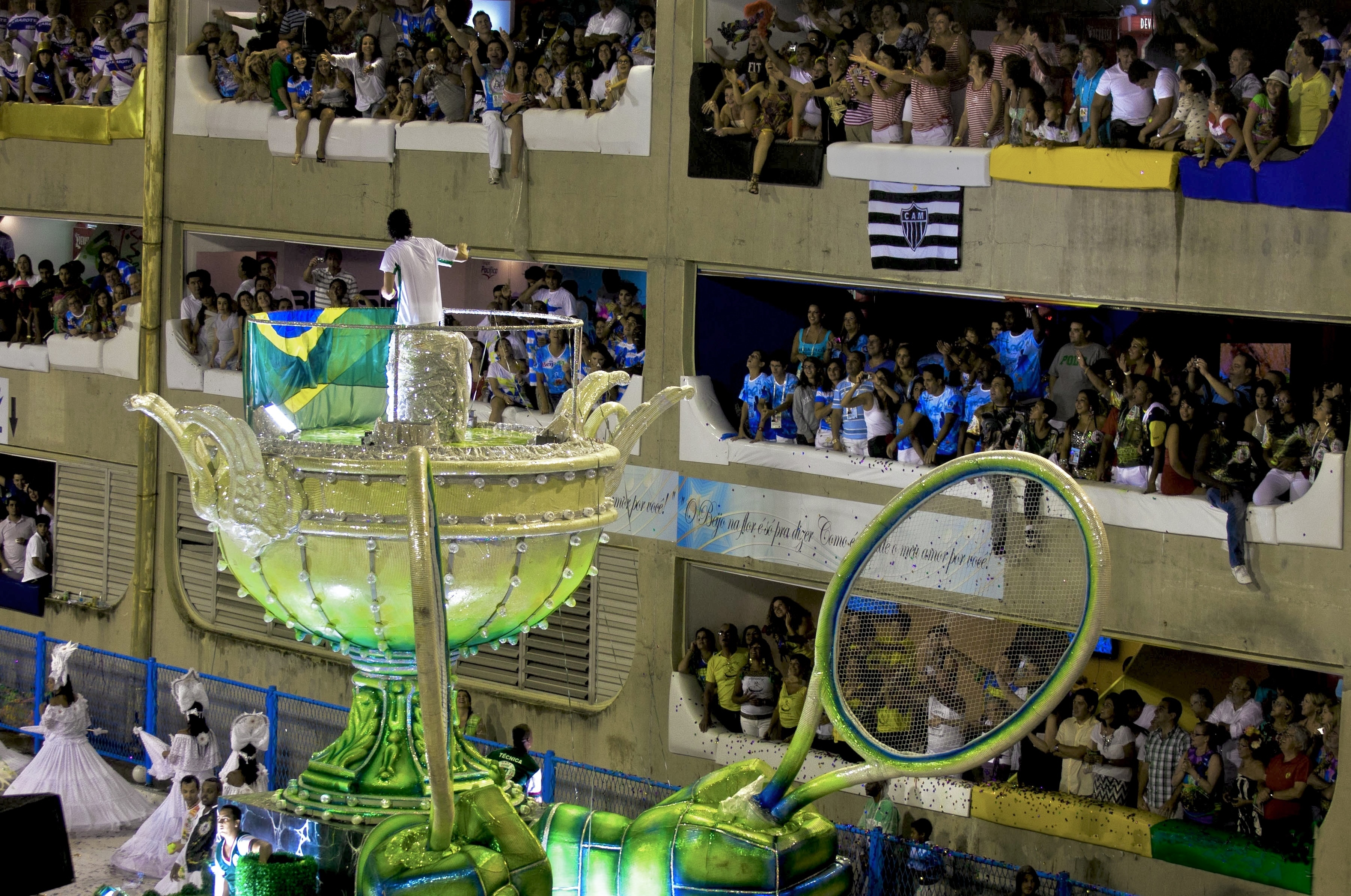 Lors du Carnaval de Rio, un char surmonté d'un immense trophée et de deux immenses raquettes de tennis; un homme, en tenue sportive, se tient au sommet de la coupe, entouré d'une barrière en verre transparent.